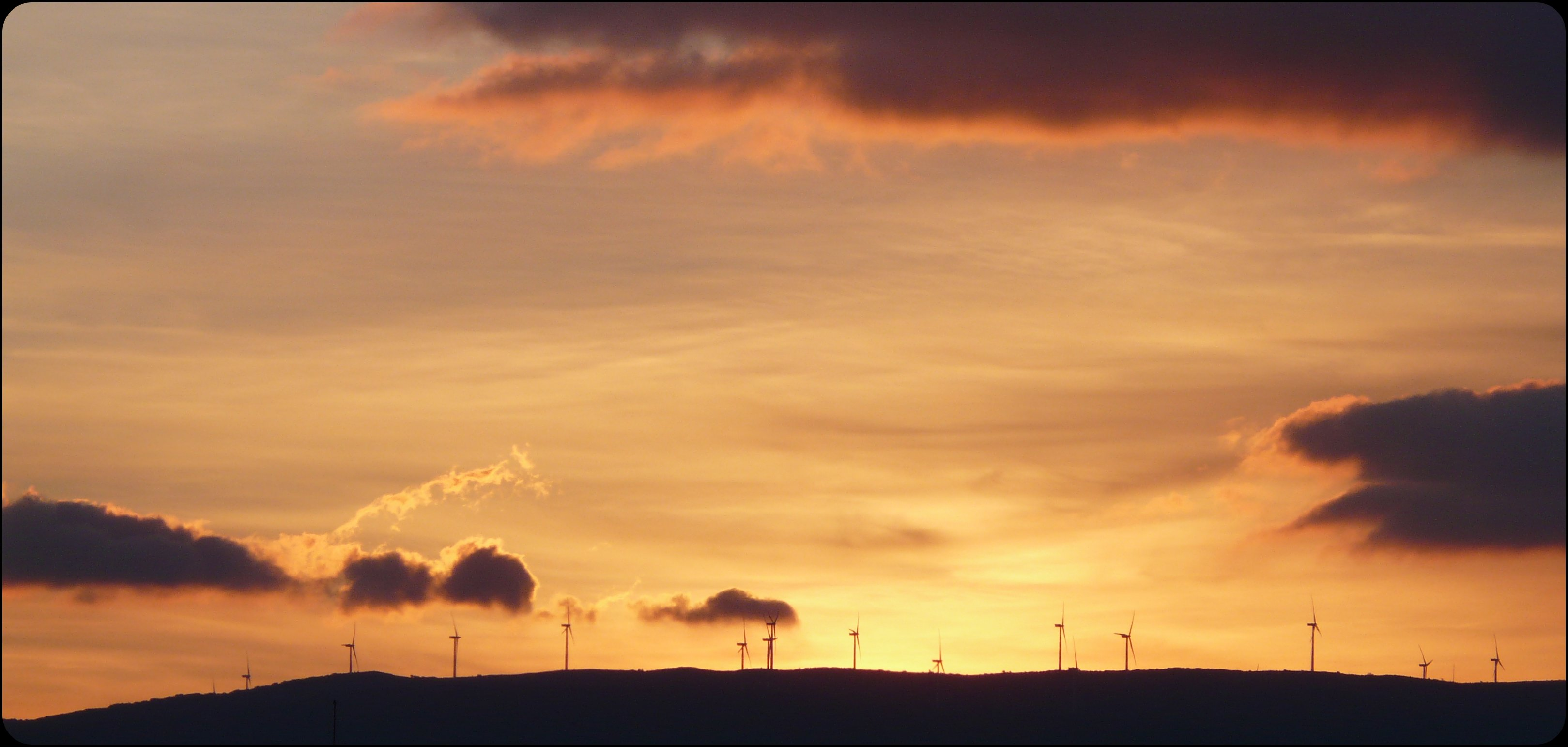 Badaiako mendilerroa